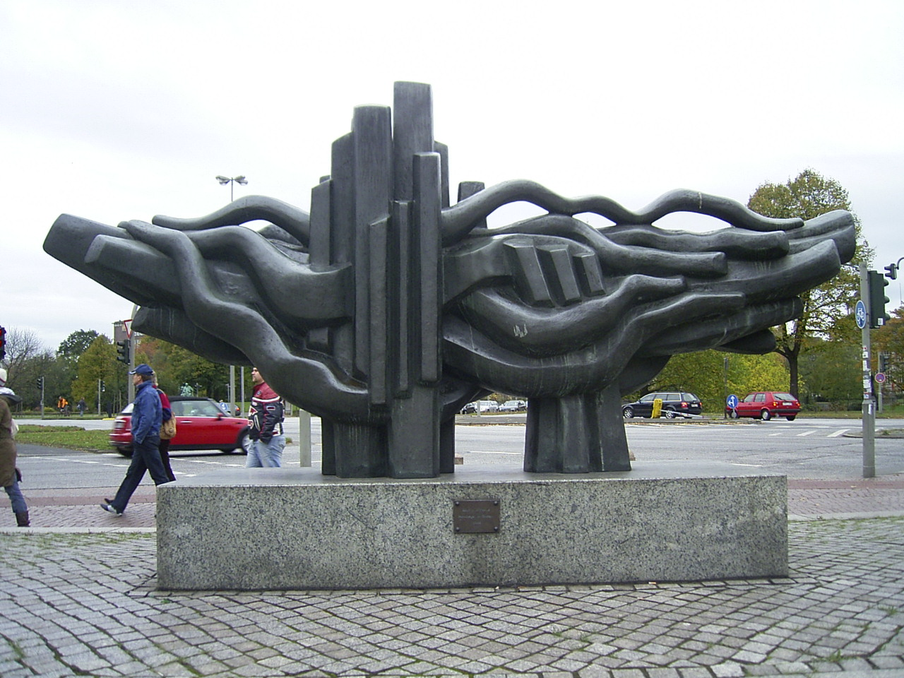 Bronzeplastik Hommage an Brahms von Maria Pirwitz (geschaffen 1981) vor der Laeiszhalle in der Hamburger Neustadt.